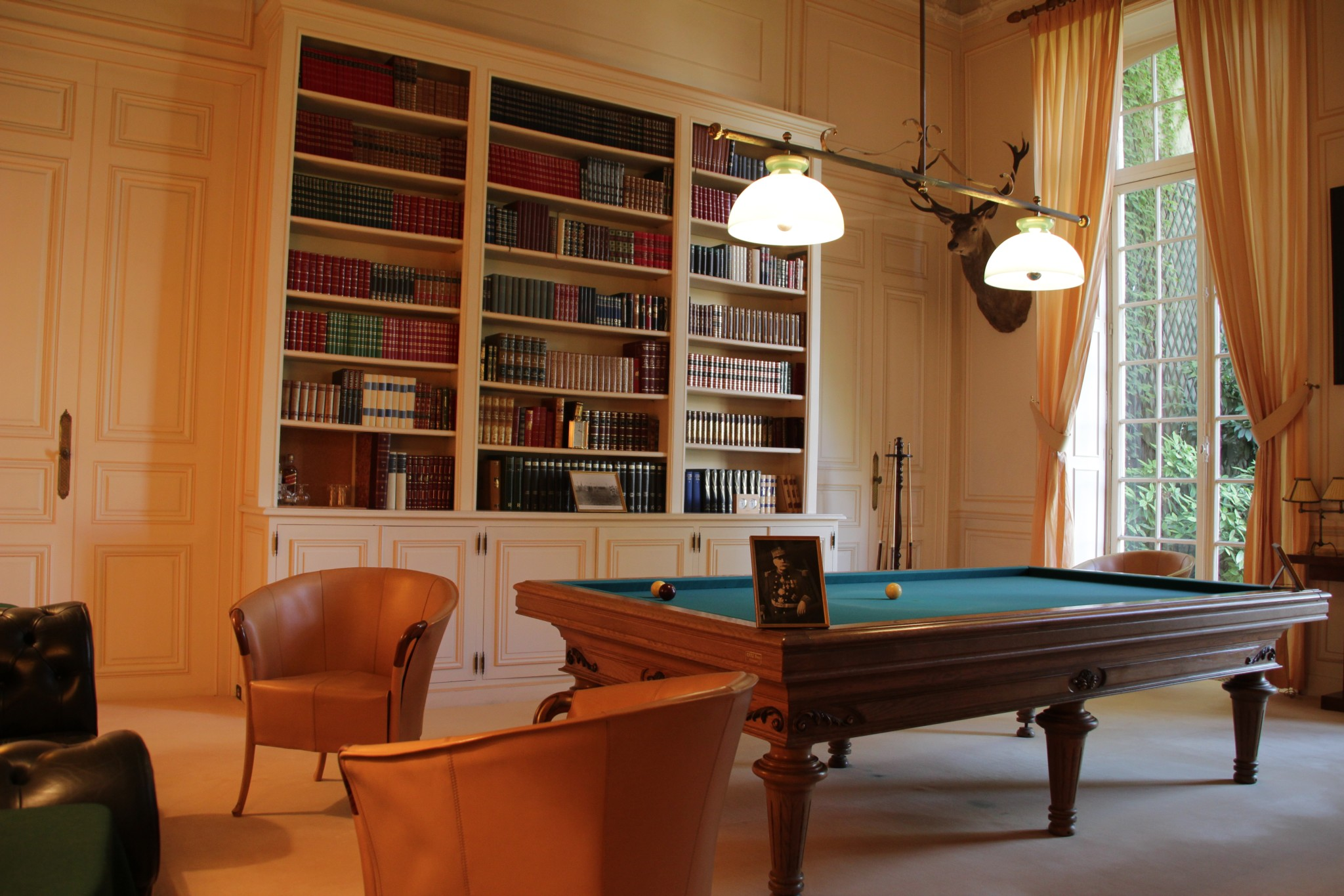 Salle de billard de l'Hotel de Noirmoutiers .